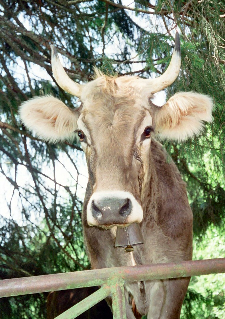 Koe, gefotografeerd in Zwitserland aug-2000